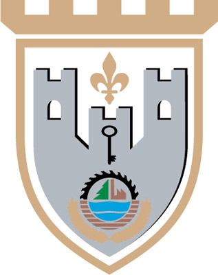 Wappen von der Gemeinde und Stadt Ključ